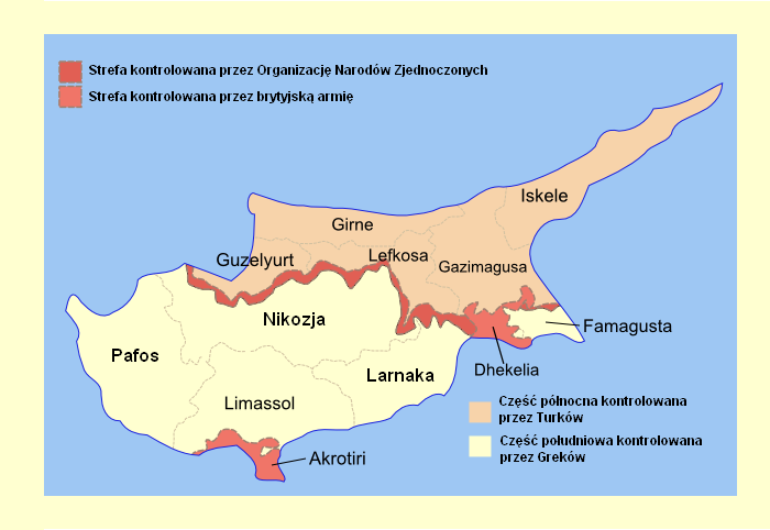 Przetłumaczona na polski mapa Cypru